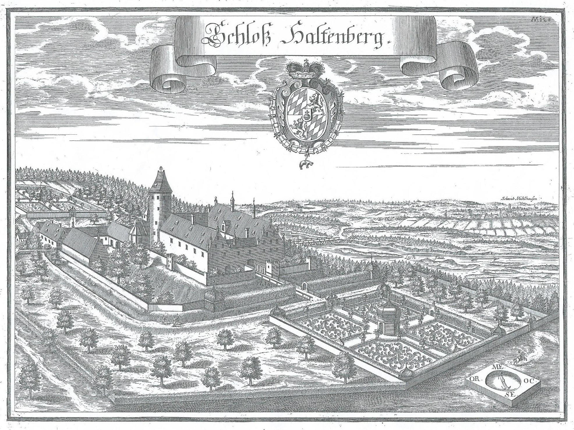 Burg Haltenberg am Lech (Kuperstich)